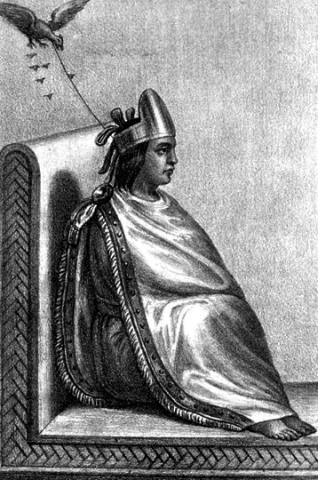 Cuauhtémoc, tlatoani mexica.